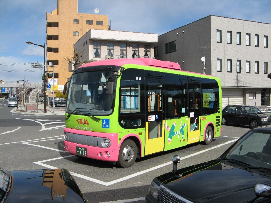 高崎市コミュニティバス「ぐるりん」。群馬バス高崎230あ626。新町駅前で撮影。